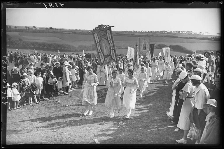 Sainte-Anne-la-Palud : le pardon début XXe (Noël Le Boyer, base Mérimée) 2